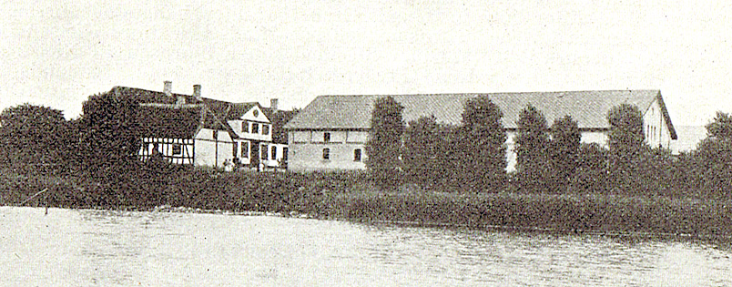 Flenstofte i bevarede kilder nævnes Flenstofte første gang i 1295, men er første oprettet som hovedgård i 1572. Gården ligger i Dreslette Sogn, Båg Herred, Haarby Kommune. Hovedbygningen er opført i 1748 og ombygget i 1798.